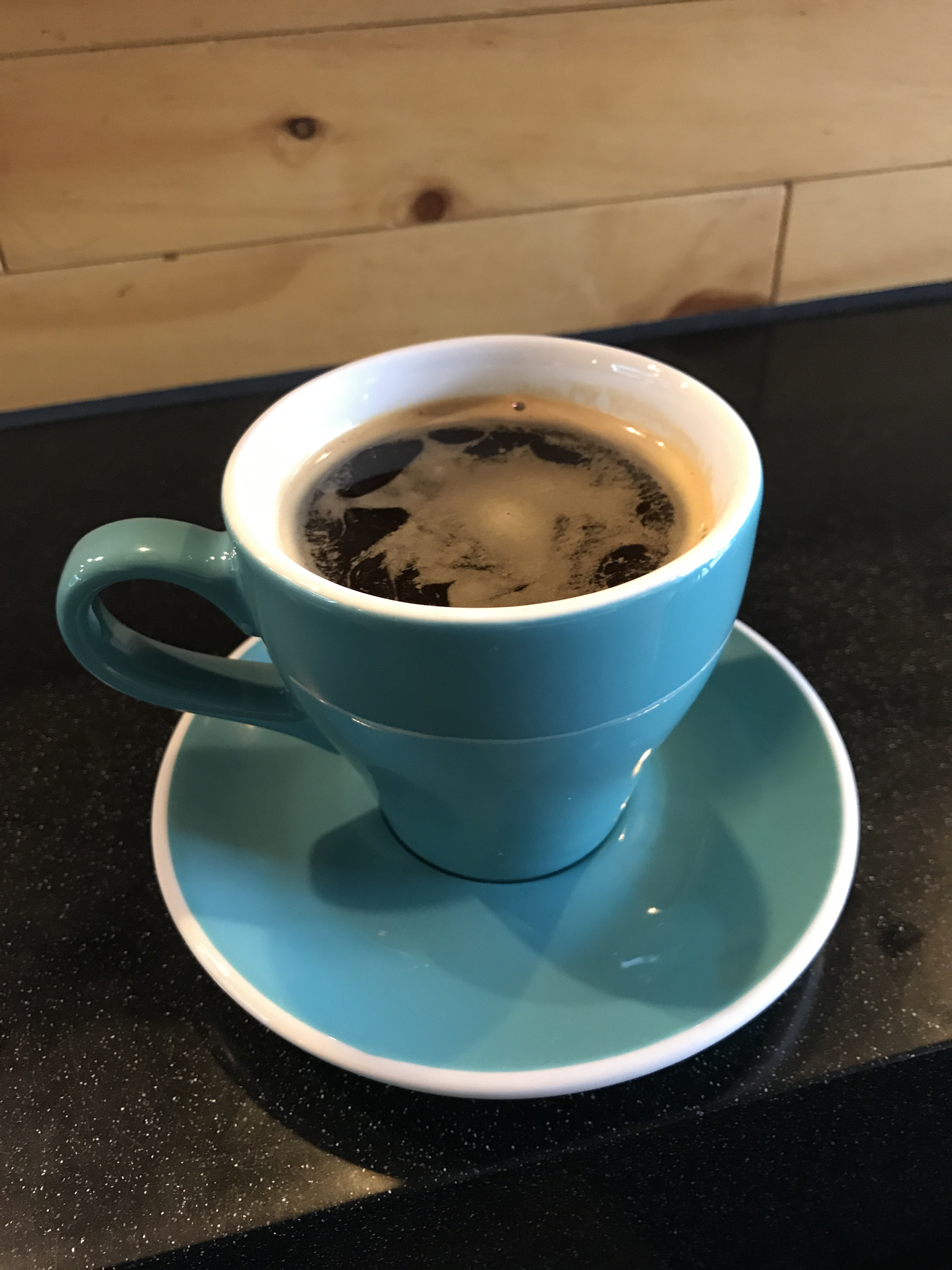 롱 블랙 커피